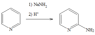 Reazione di Chichibabin (senza sfondo colorato e dida in italiano) Disegnata da Paginazero